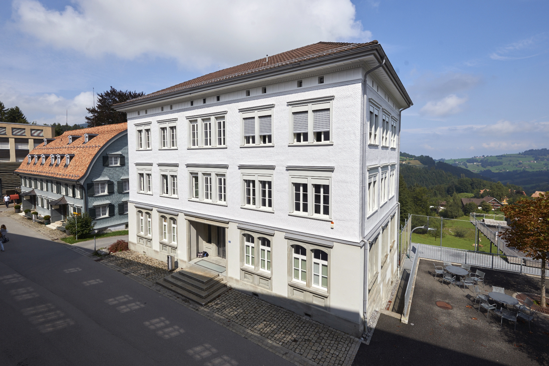 Altes Schulhaus, Kantonsschule Trogen